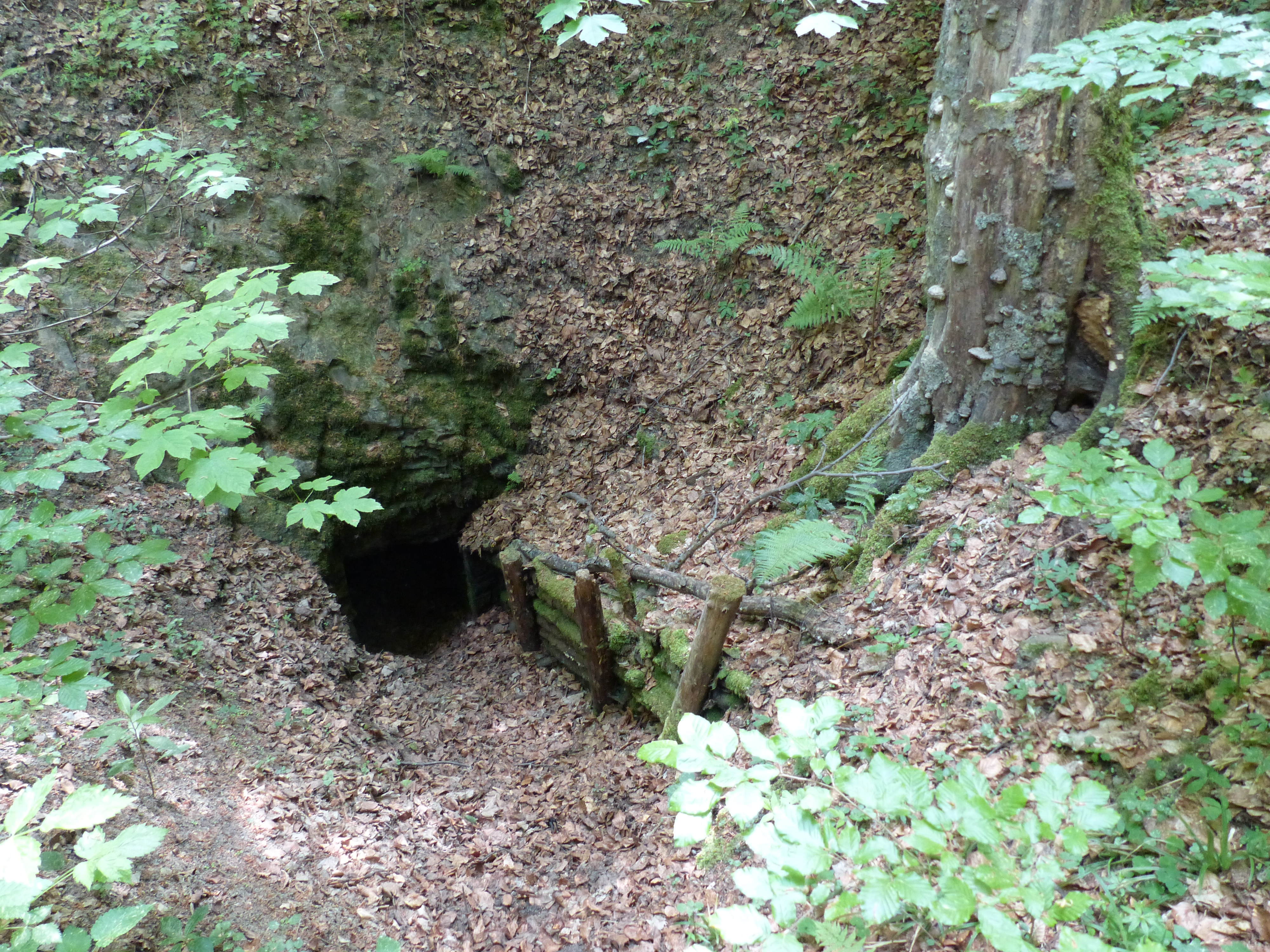 Eingang der Humboldthöhle